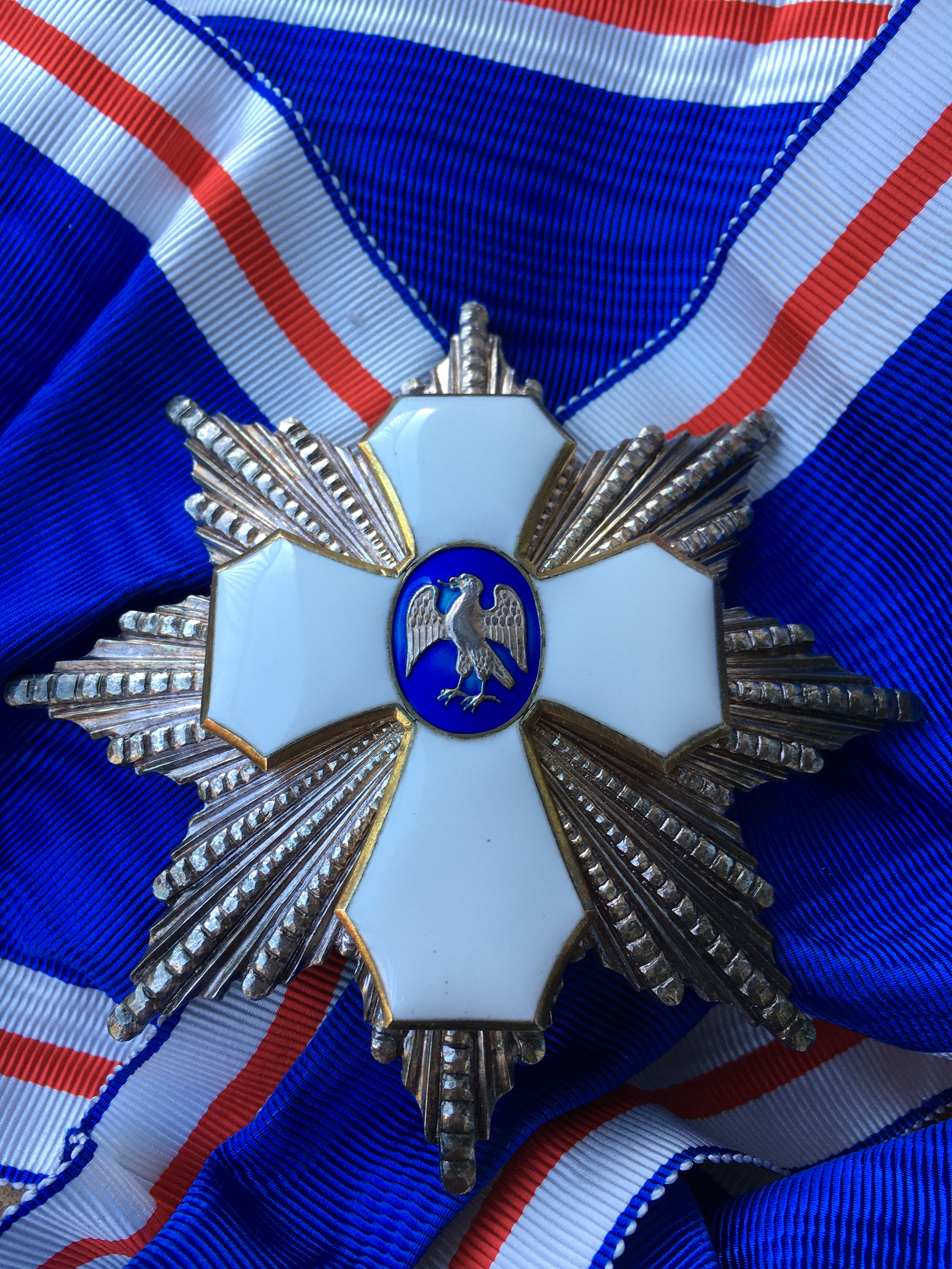 Placa de Gran Cruz de la Orden del Halcón, República de Islandia. AEA Collections